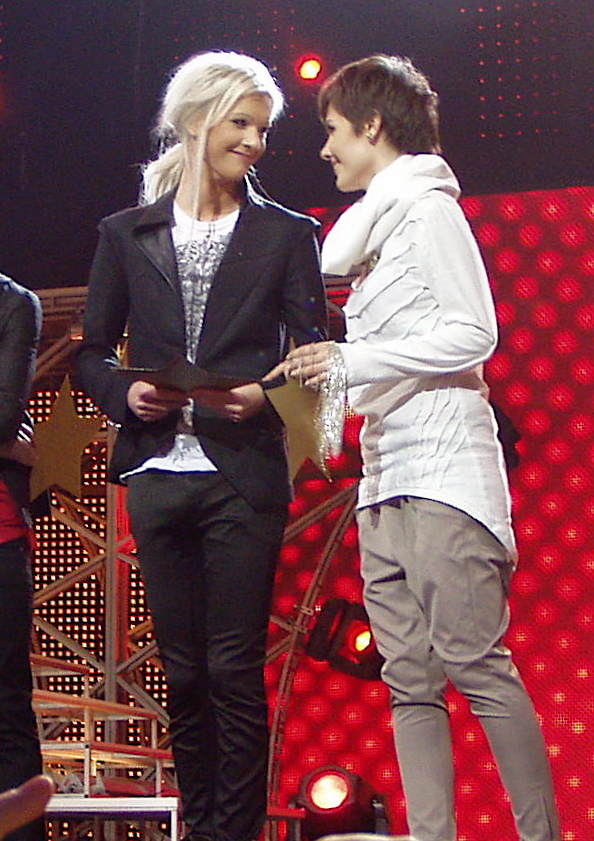 Борис Апрєль, Еріка. "Суперфінал". Виступ з Ерікою.